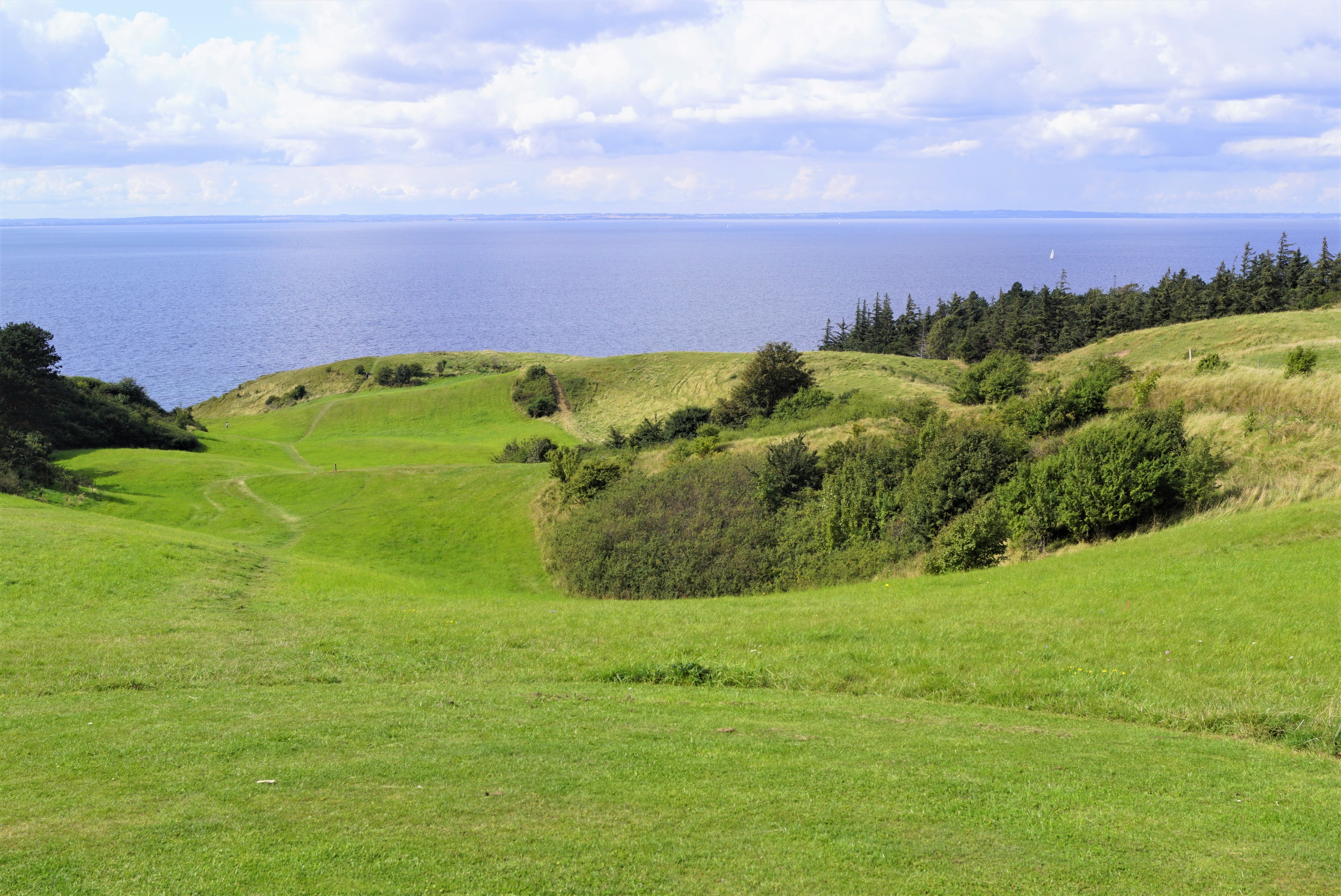 Nordby Bakker, Udsigt fra Ballebjerg